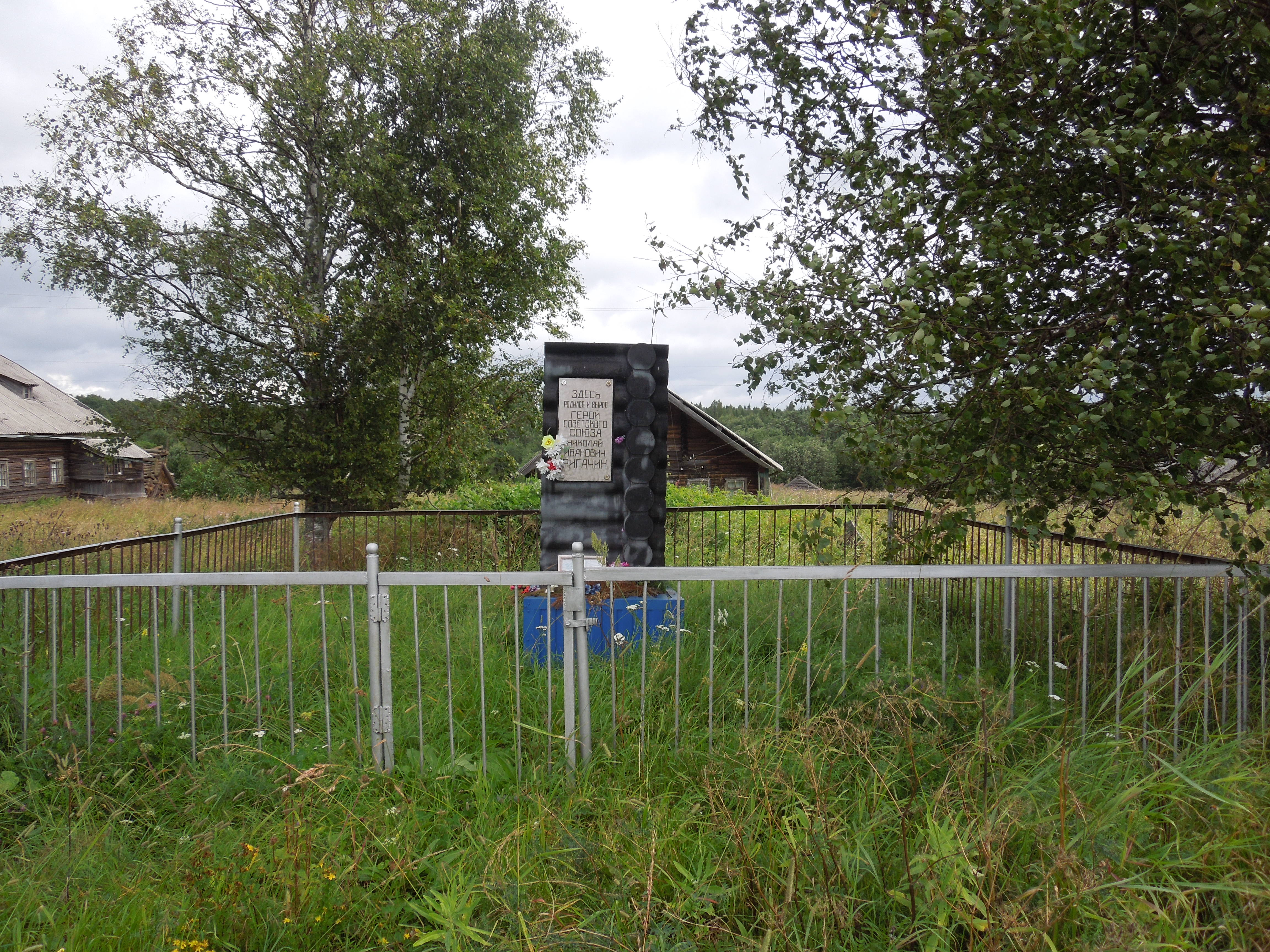 Место, где стоял дом, в котором родился и жил герой Советского Союза Н.И. Ригачин: Типиницы, Медвежьегорский район, Карелия